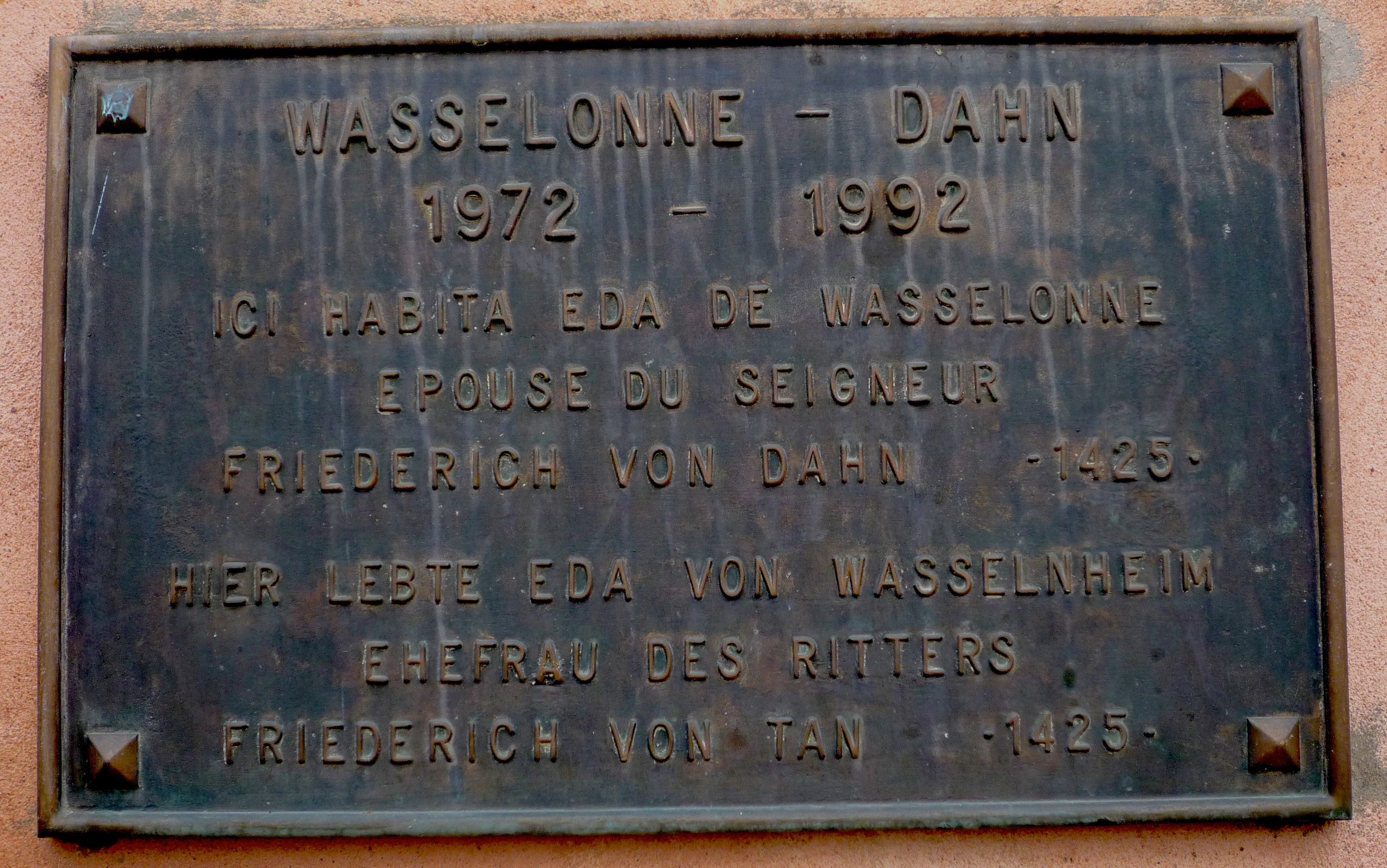 Wasselonne Dahn plaque jumelage 1992